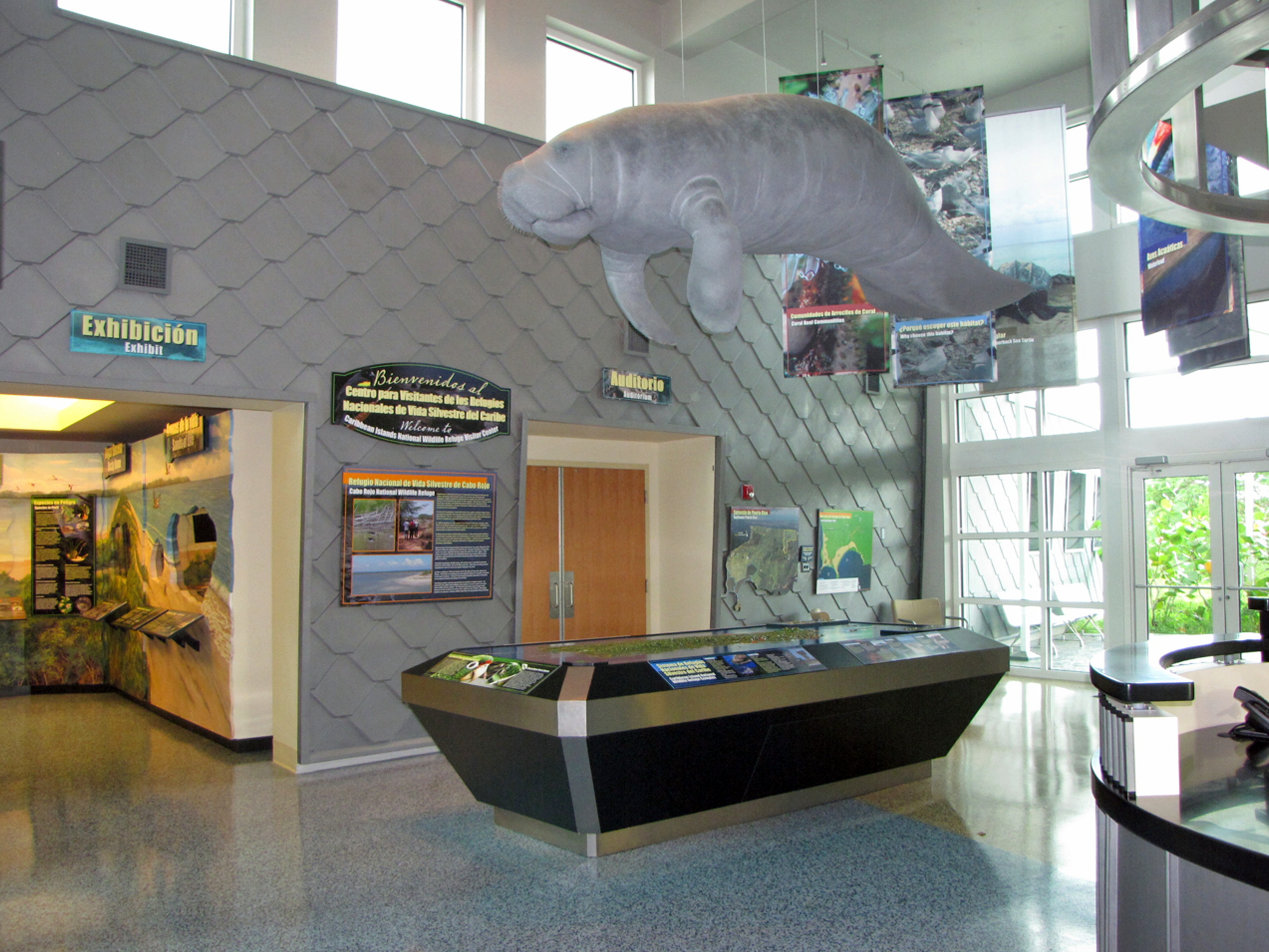 Recepción del Centro de Visitantes del Refugio de Aves y Vida Silvestre